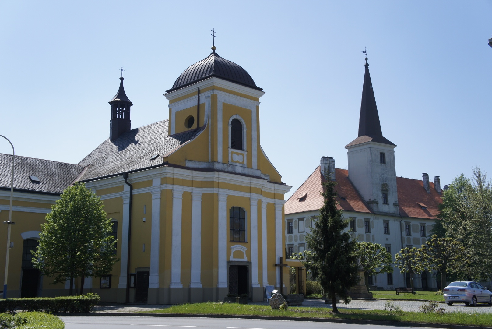 Kostel sv. Jiljí (Chropyně), nám. Svobody, Chropyně